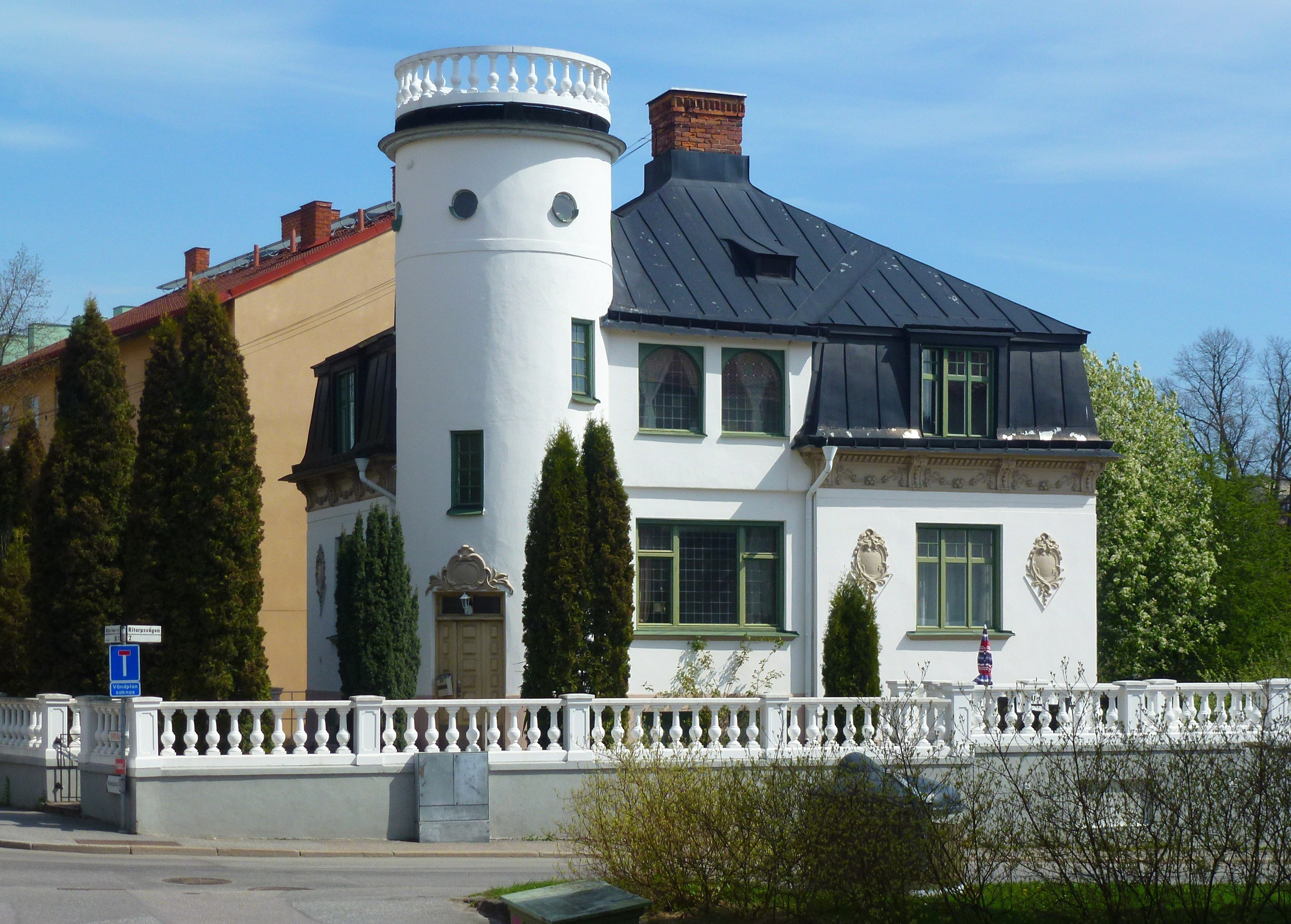 Sofielund "Tornvillan" i Ritorp, Solna kommun